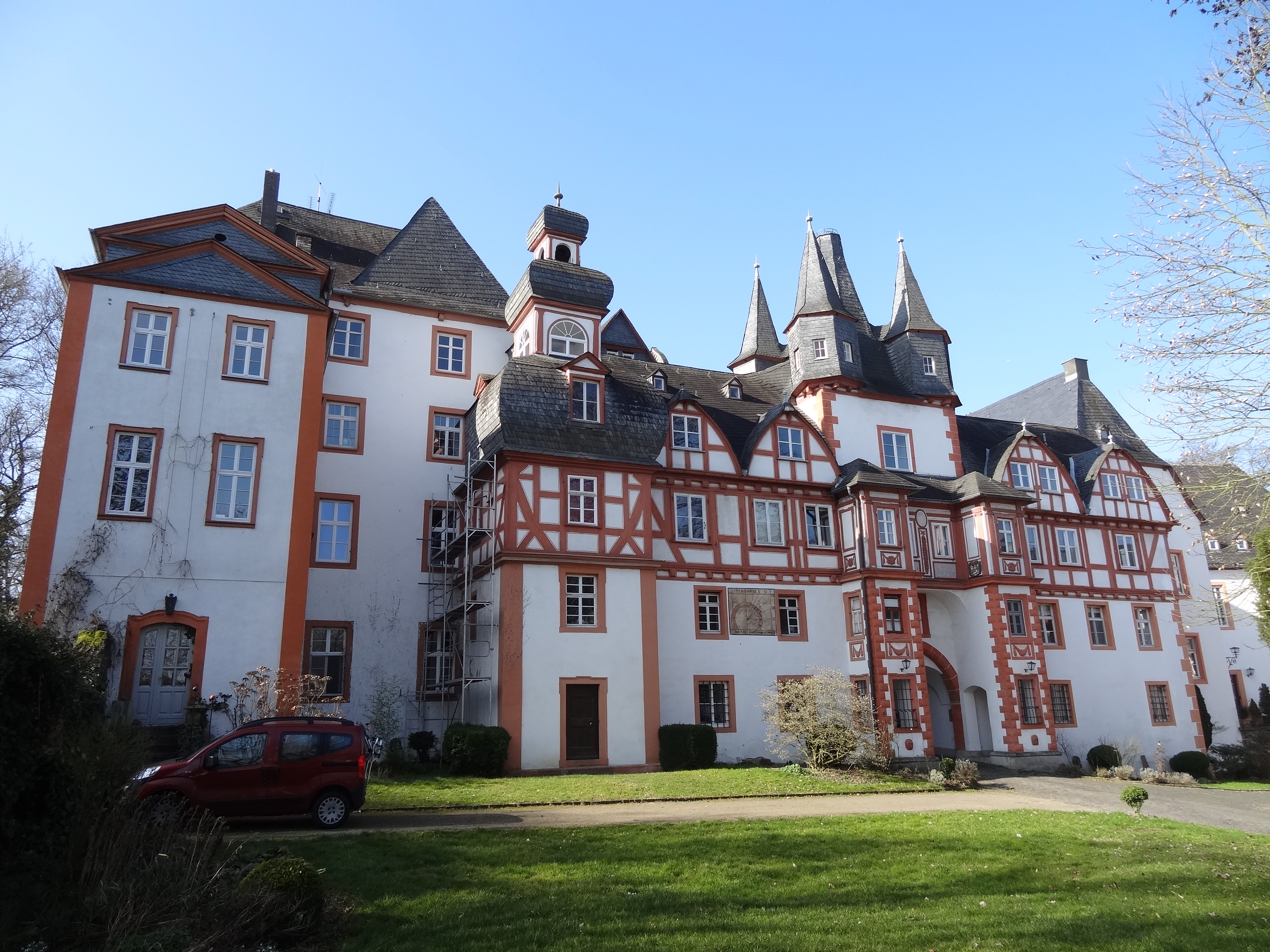 Schloss Hungen